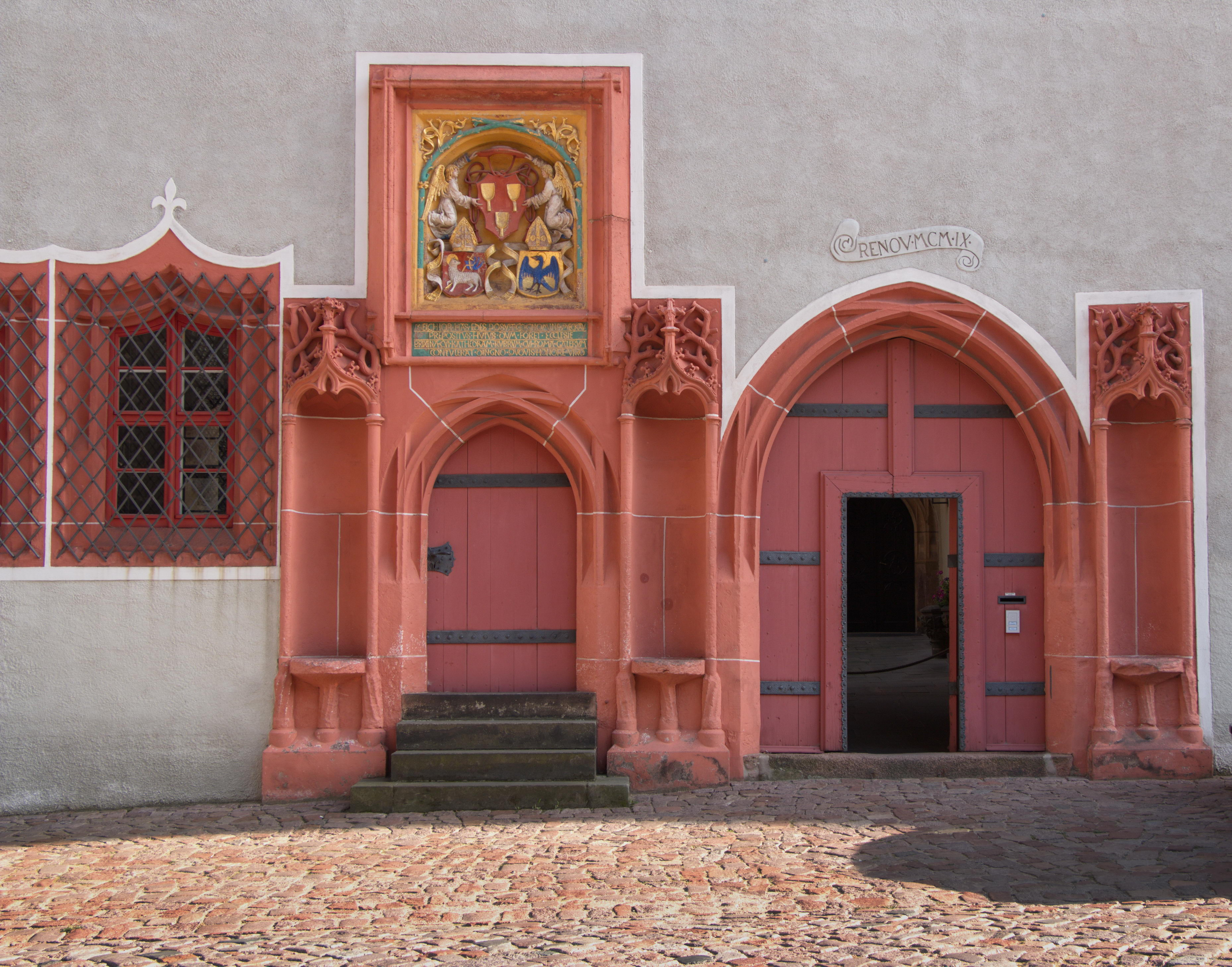 Meißen, Domplatz 7, Dompropstei, Außenansicht